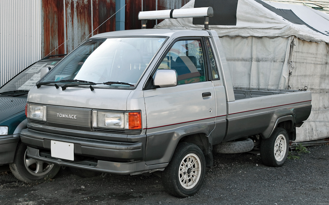 Toyota Townace Truuk 1.5 Super X